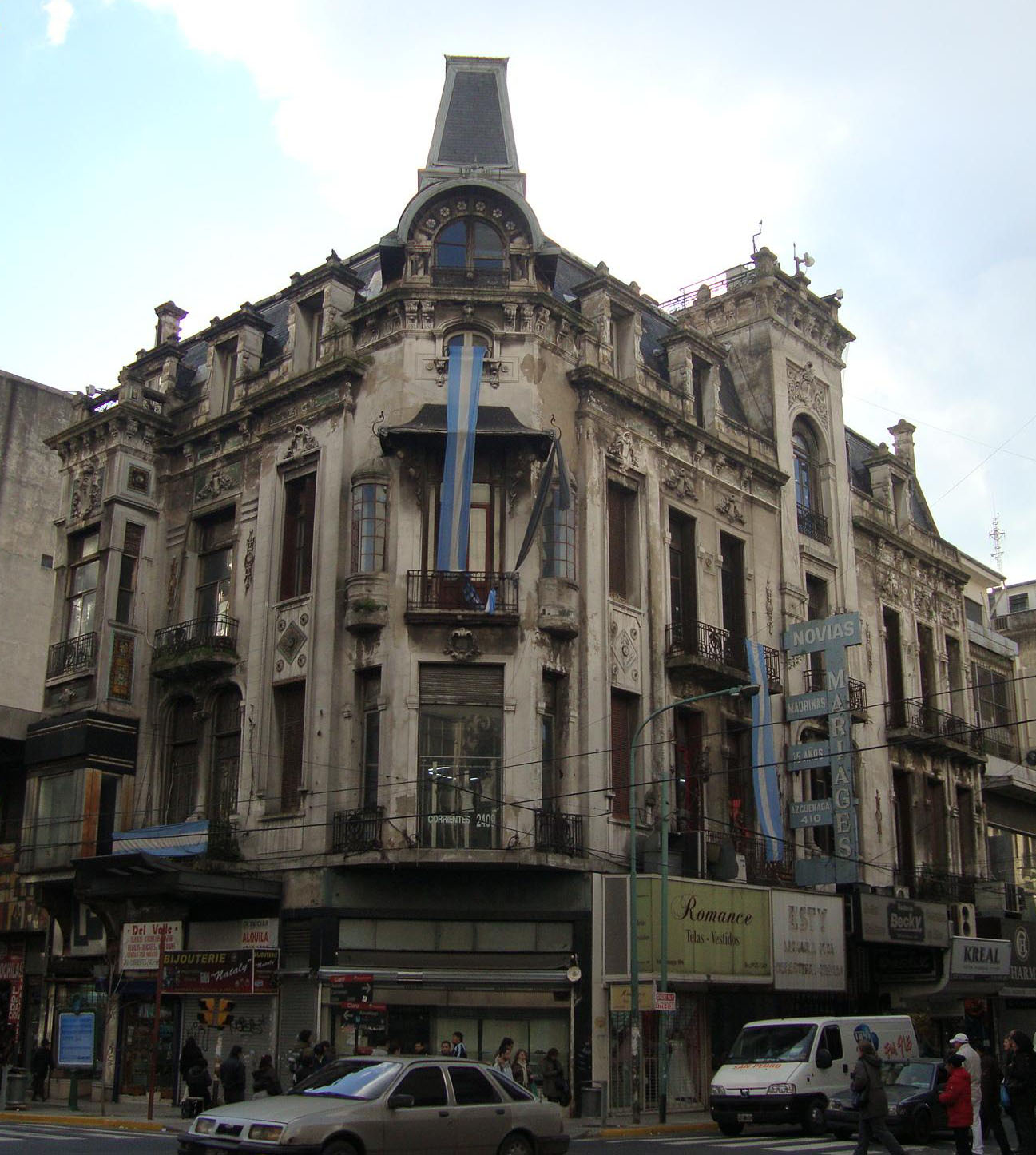 Edificio en Avenida Corrientes 2409, esquina Azcuénaga. Arquitecto: Alfred Massüe Estilo: Art Nouveau Buenos Aires, Argentina.